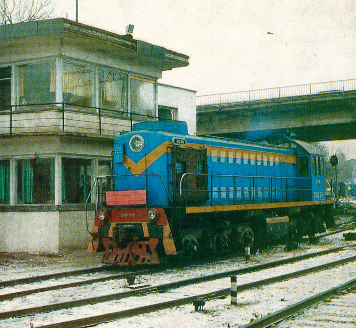 С завода поступил в депо Вильнюс Прибалтийской ж. д. Передан в ТЧ Черняховск в 1990 г.